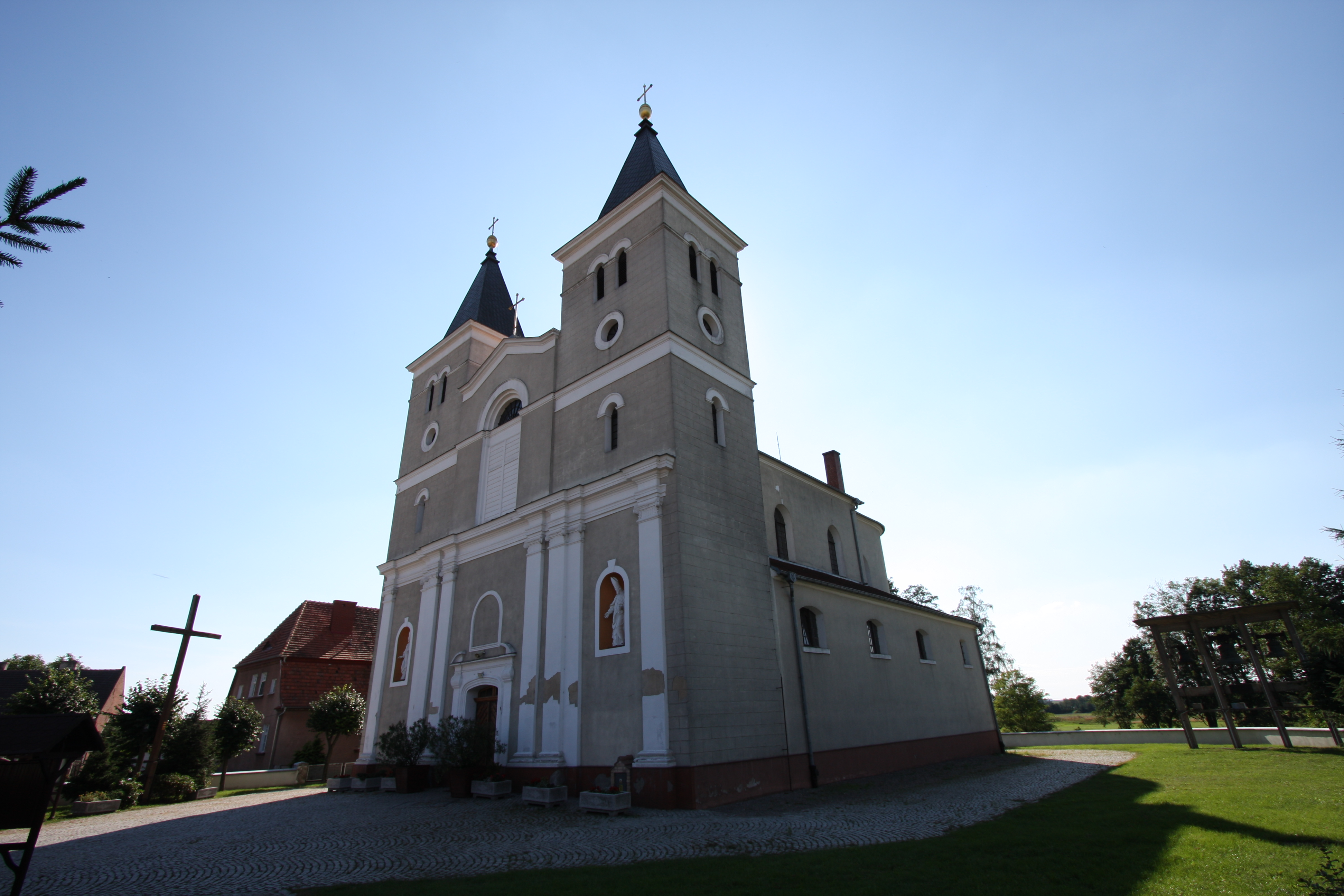 Babimost, kościół par. p.w. św. Wawrzyńca, mur., 1730-1740, 1833